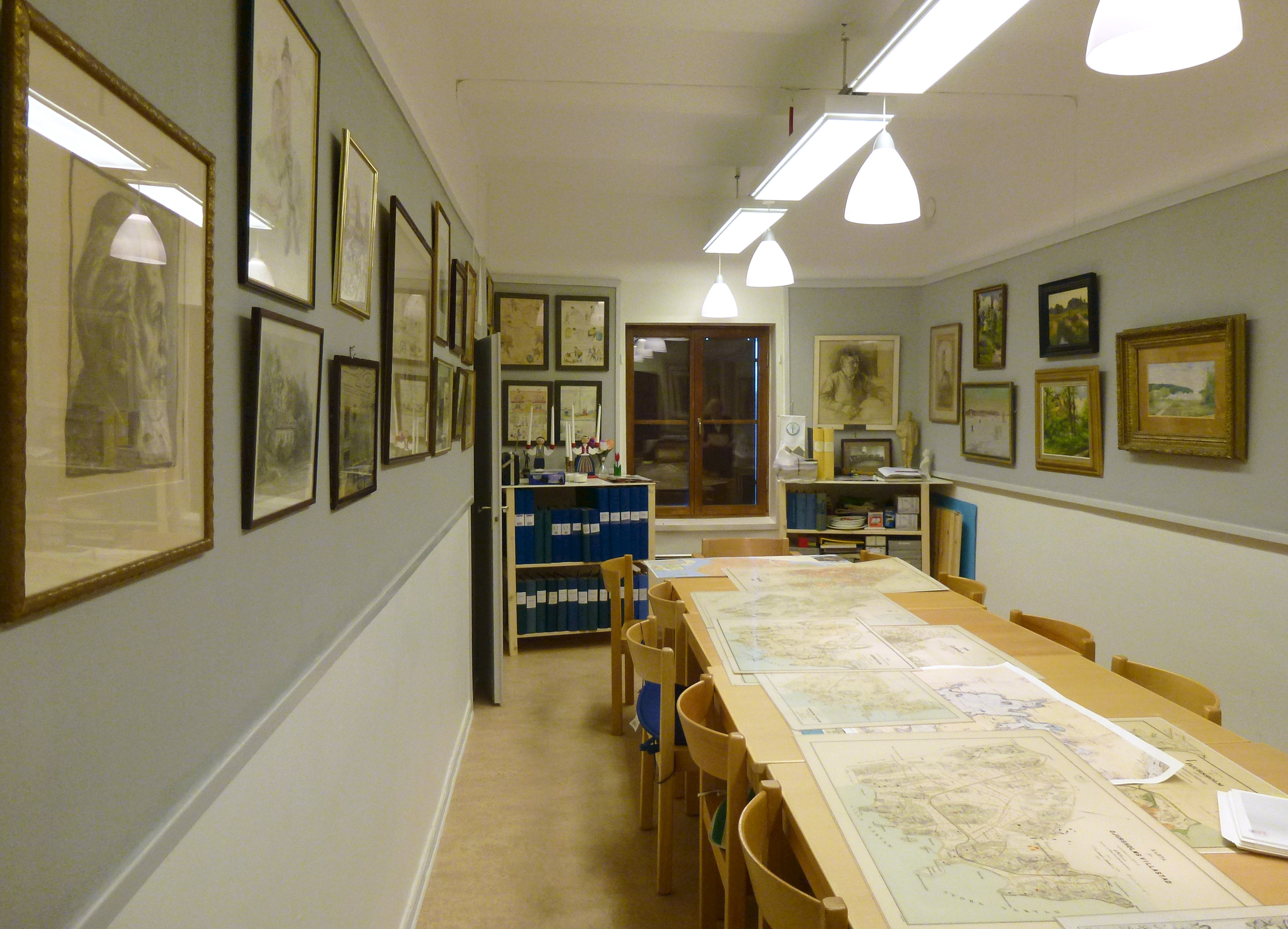 Styrelserummet Samfundet Djursholms forntid och framtid